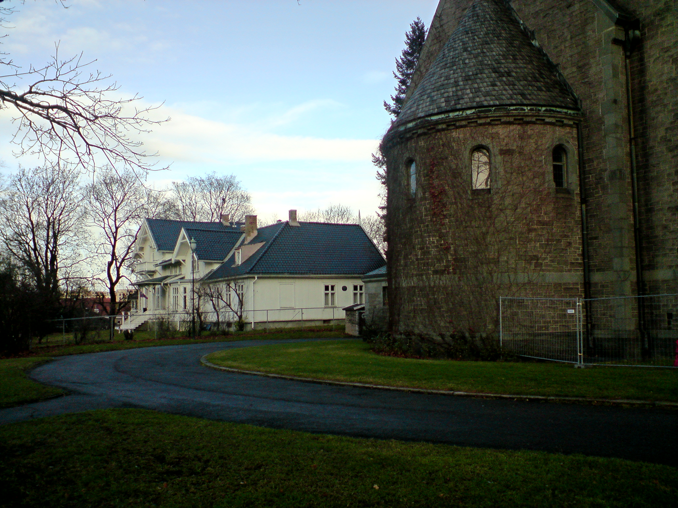 Vålerenga gård med del av kirken til venstre